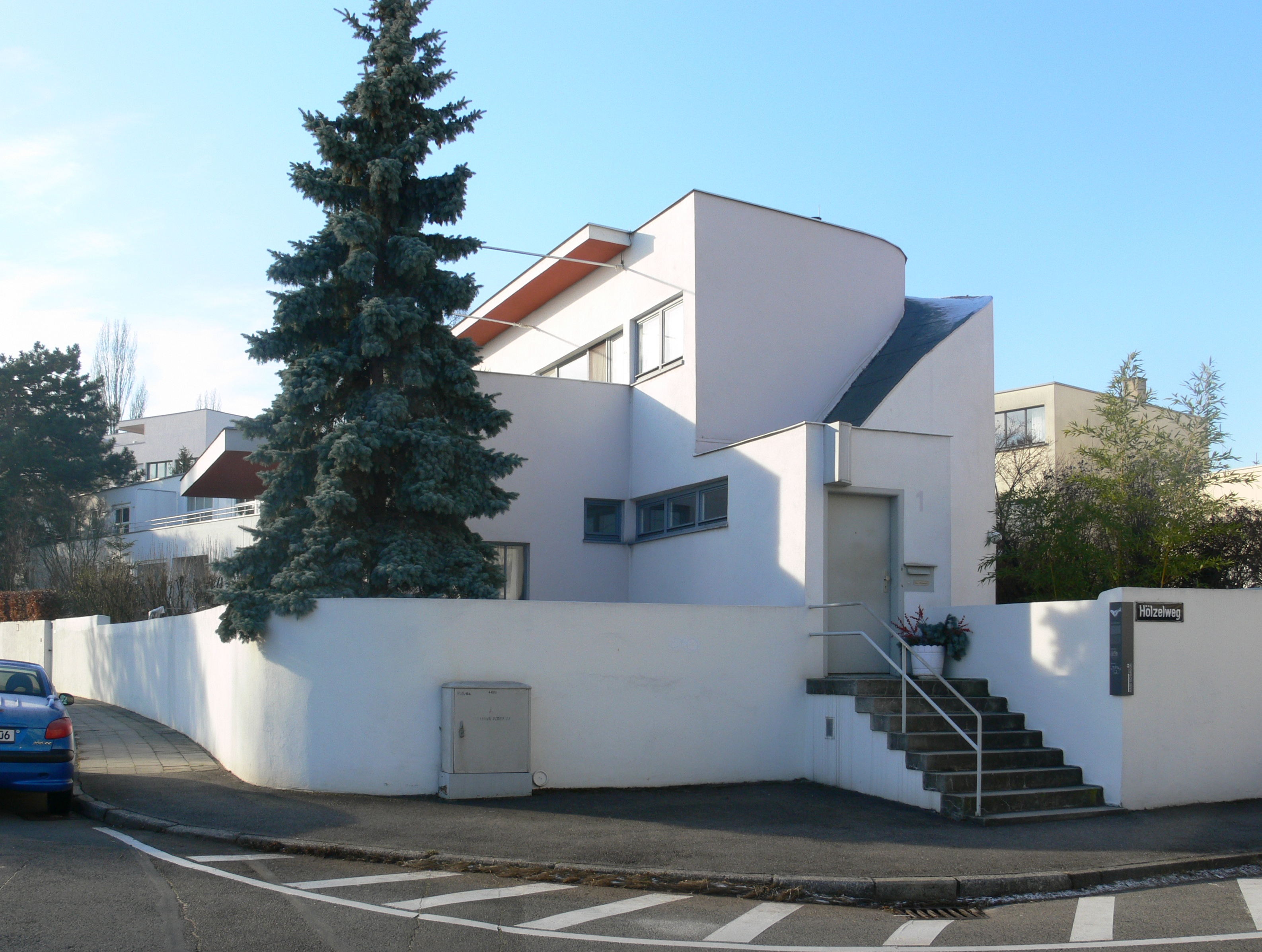 Stuttgart, Weißenhofsiedlung, Haus von Hans Scharoun